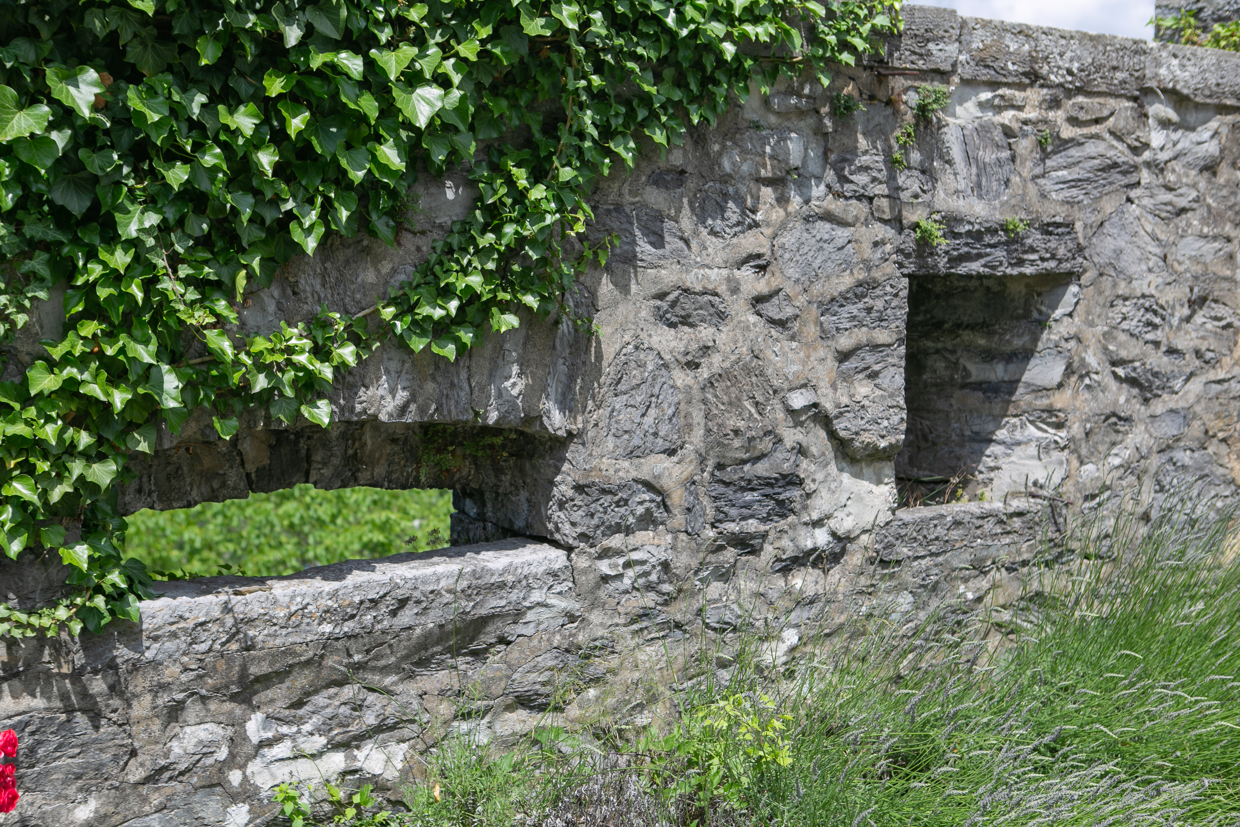 Vue Fort d'Aiton / Aiton / Savoie / France